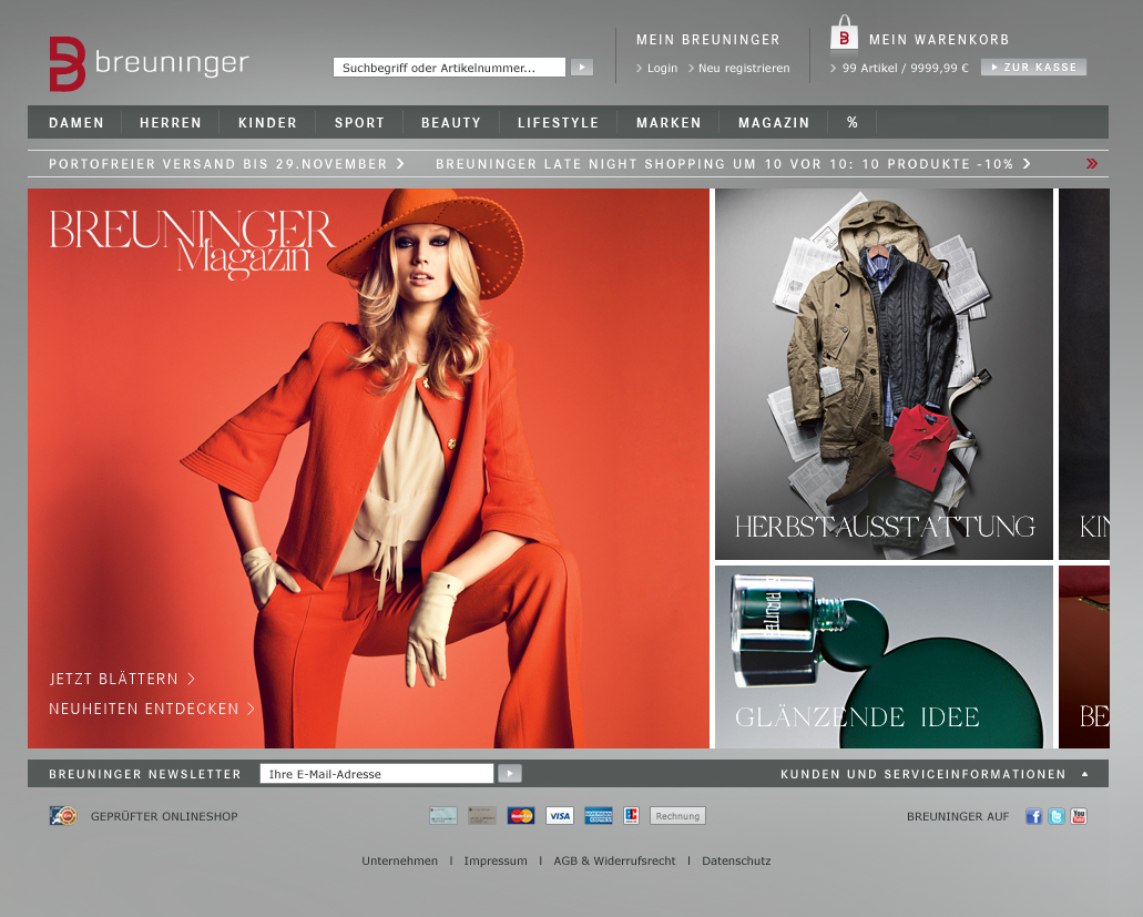 Онлайн-магазин "Бройнингер", 2008 год